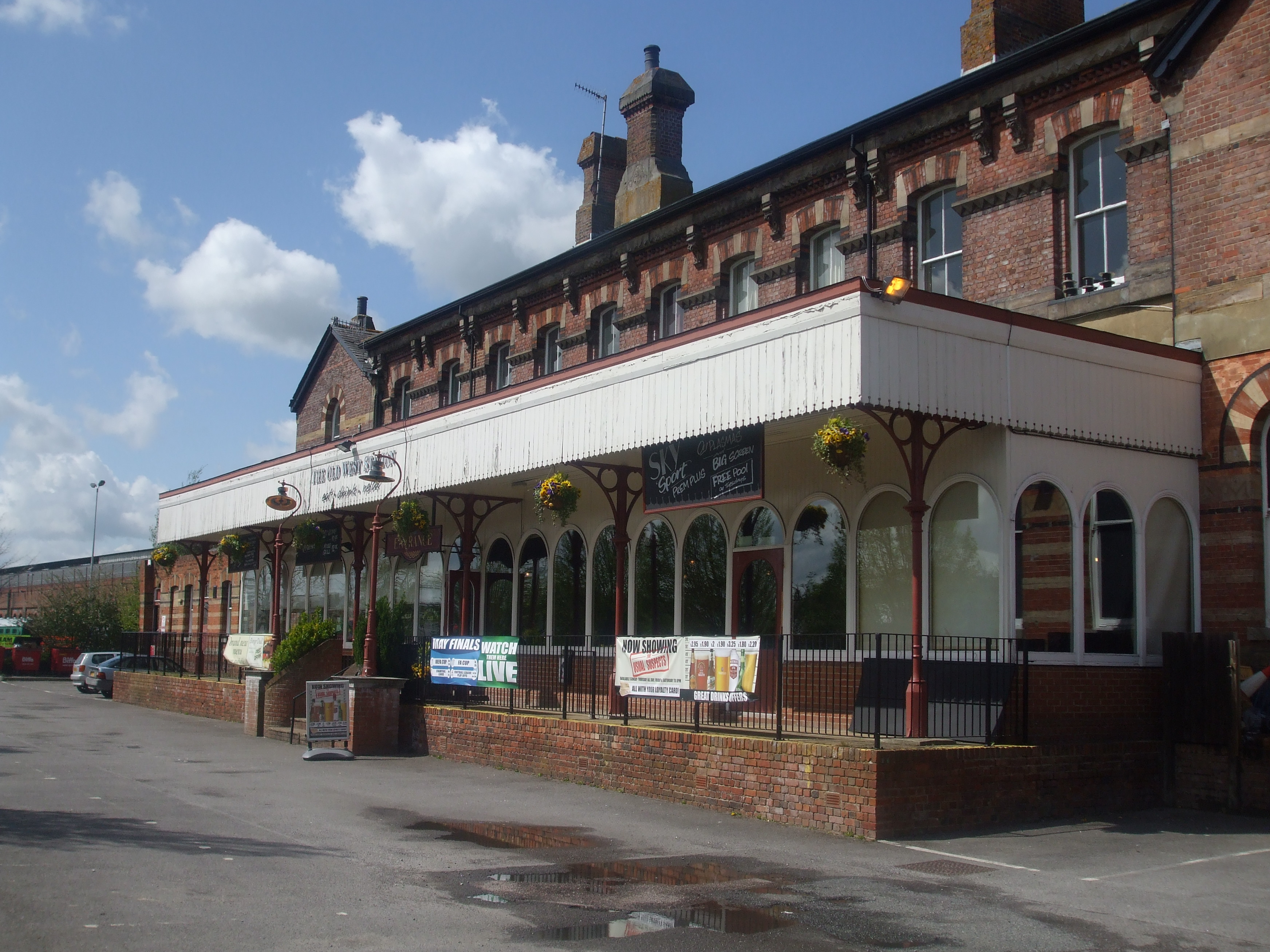 Tunbridge Wells West Station, Kent